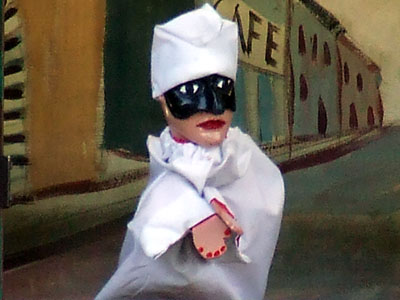 Pulcinella, marionetta del "teatro dei burattini" di Carlo Piantadosi, al piazzale del Gianicolo, Roma.